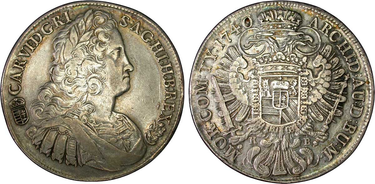 Thaler à l'effigie de Charles VI, 1740. Description avers : Tête laurée de Carolus VI à droite ; au-dessous, B . Traduction avers : (Carolus VI, par la grâce de Dieu, empereur romain toujours Auguste, roi de Germanie, Jérusalem, Hongrie et de Bohême) .